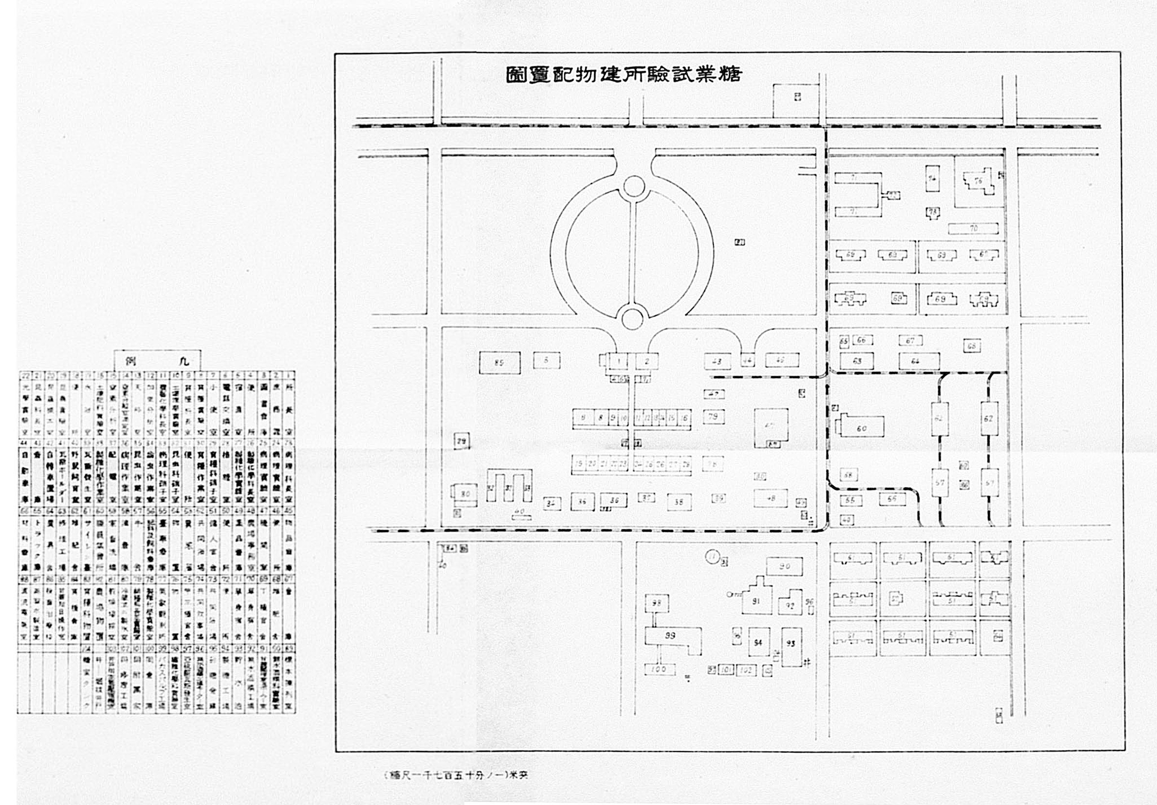 糖業試驗所位於台南市東區竹篙厝，此圖為其廳舍、工廠、研究室建物的廳舍配置圖